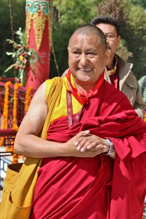 Ven Tharchin Rinpoché